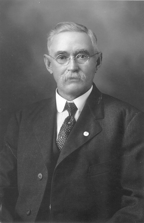 John Caldwell